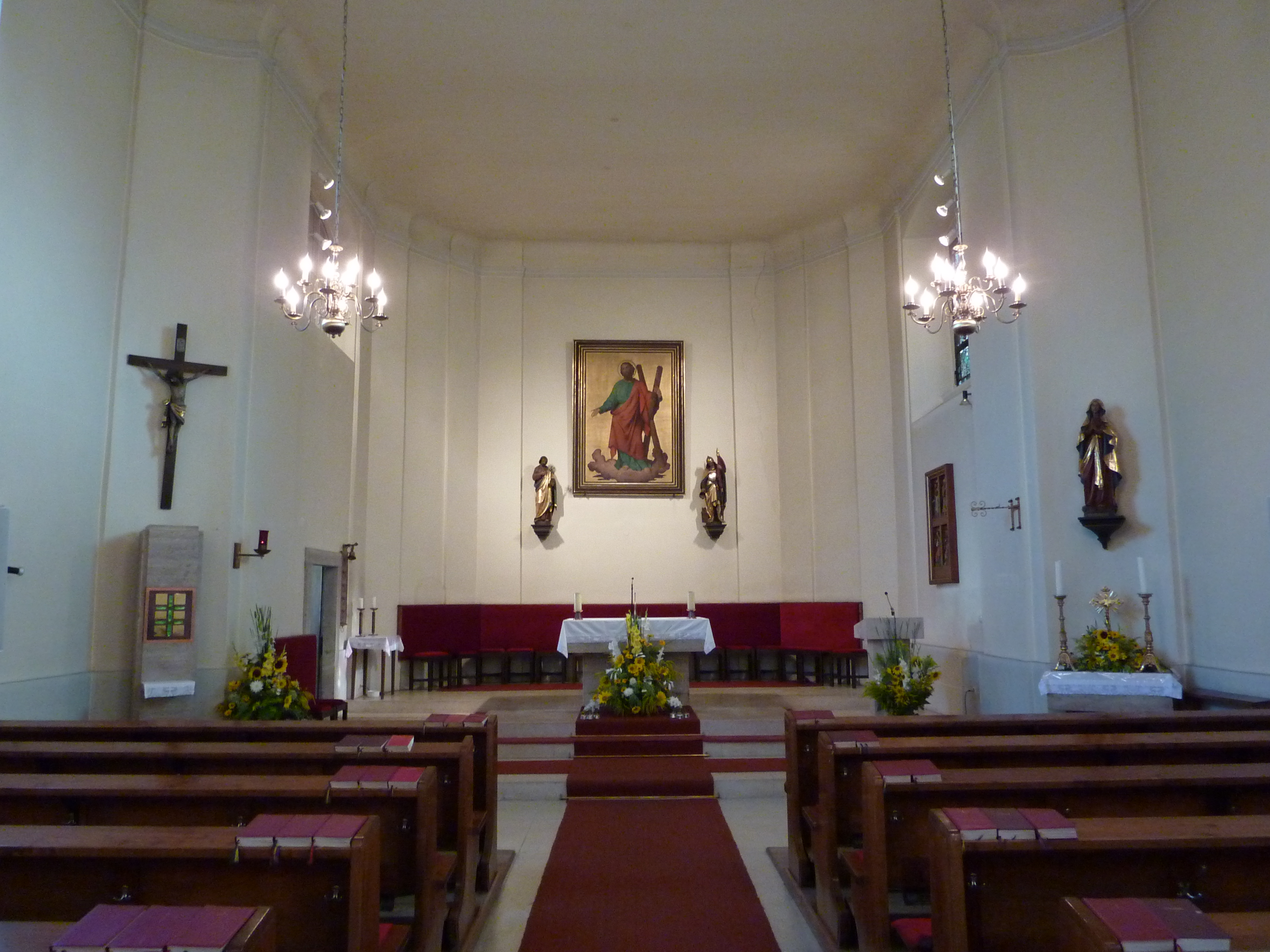 Pfarrkirche, Altenwörth, Kirchberg am Wagram, Niederösterreich